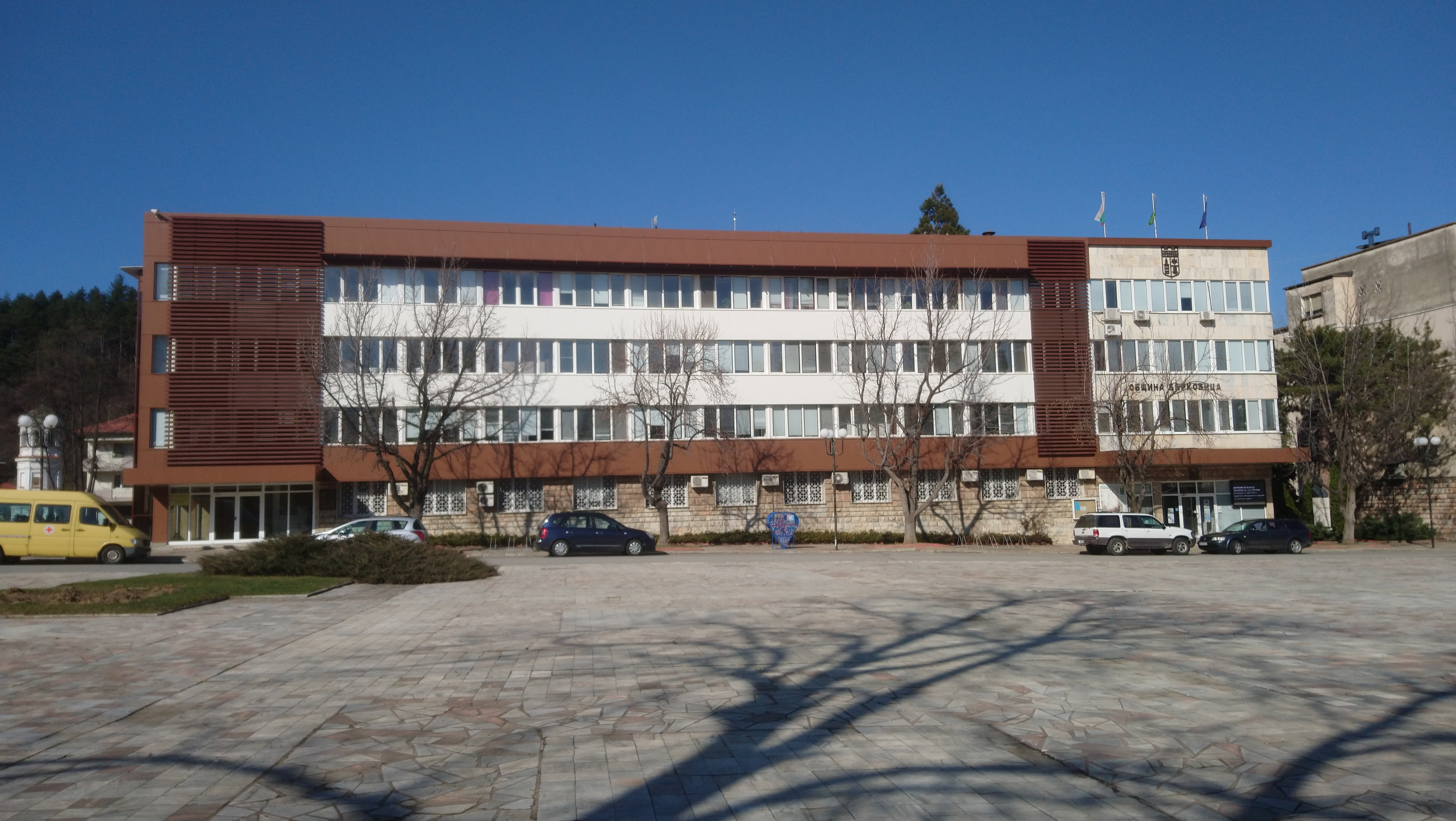 Община Берковица